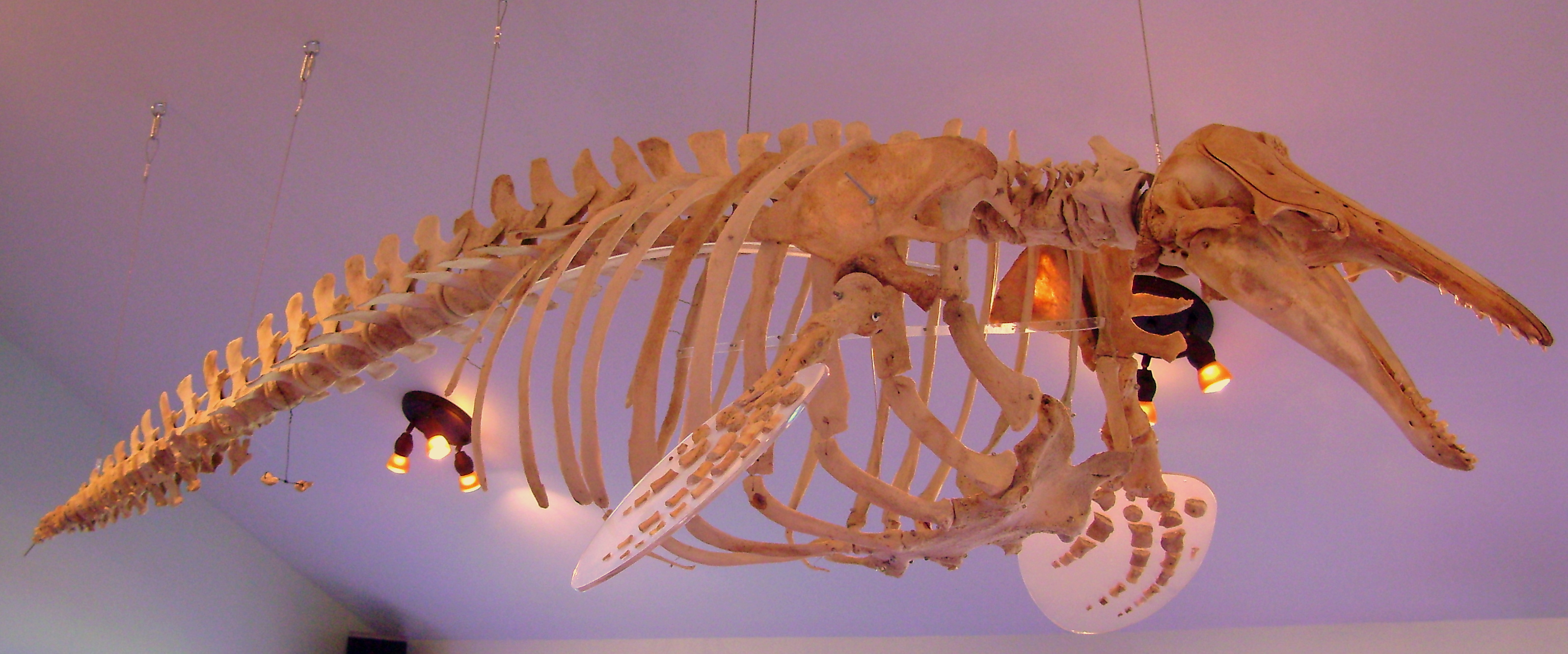 Squelette de béluga du Saint-Laurent femelle retrouvée morte échouée près de Sainte-Flavie, au Québec, exposé à la Station exploratoire du Saint-Laurent, à Rivière-du-Loup